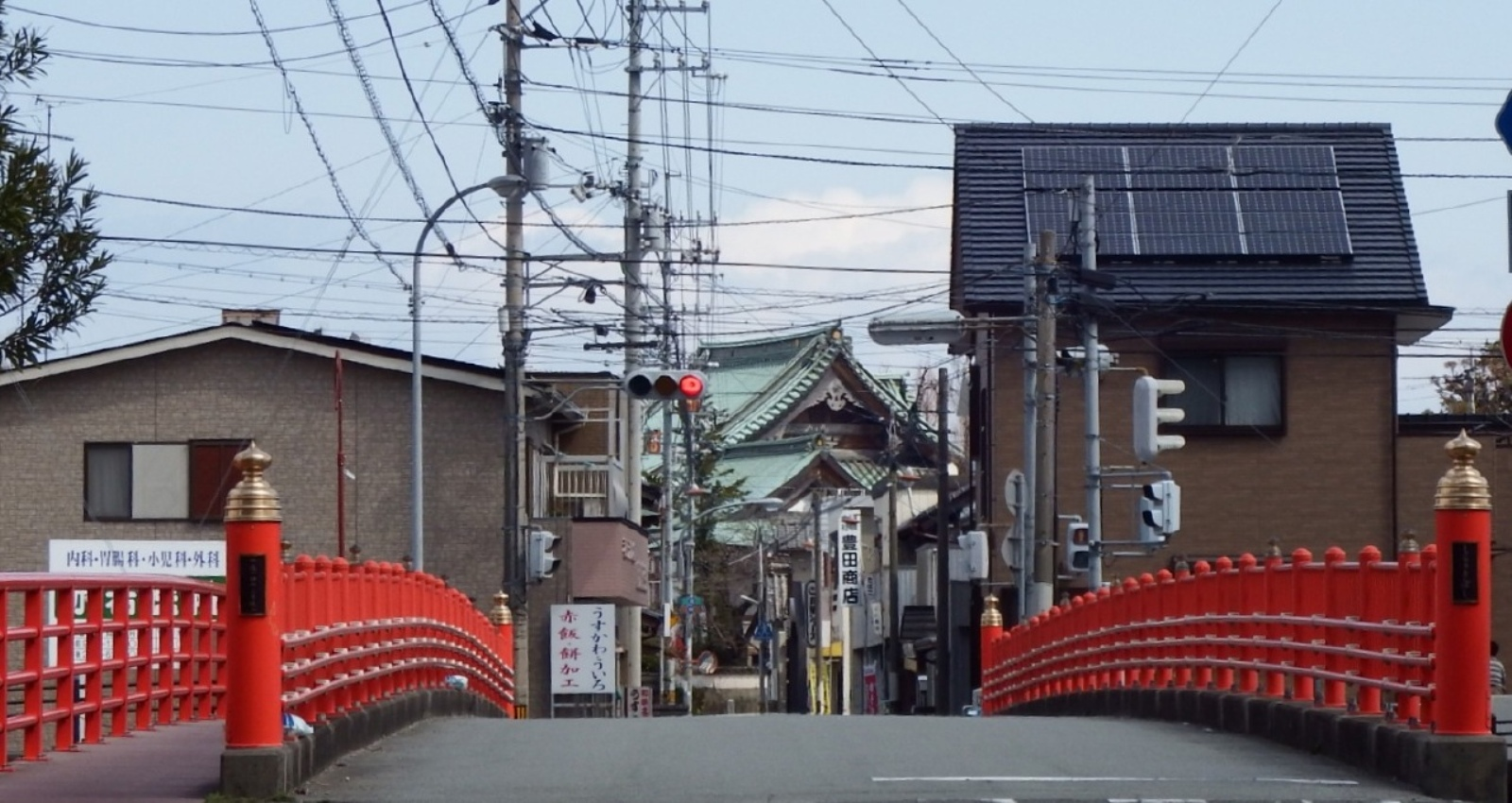 立江寺を目の前にした白鷺橋